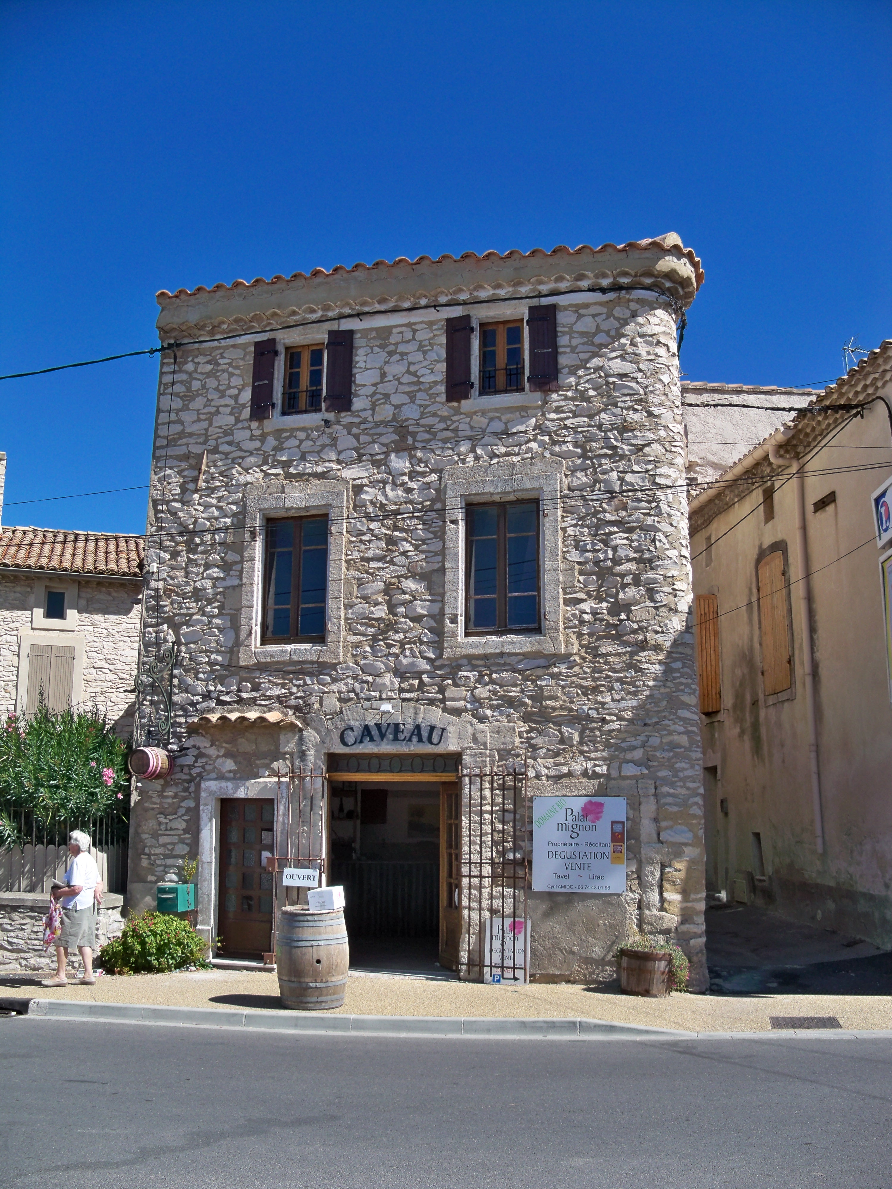 Caveu Palai Mignon à Tavel (Gard)